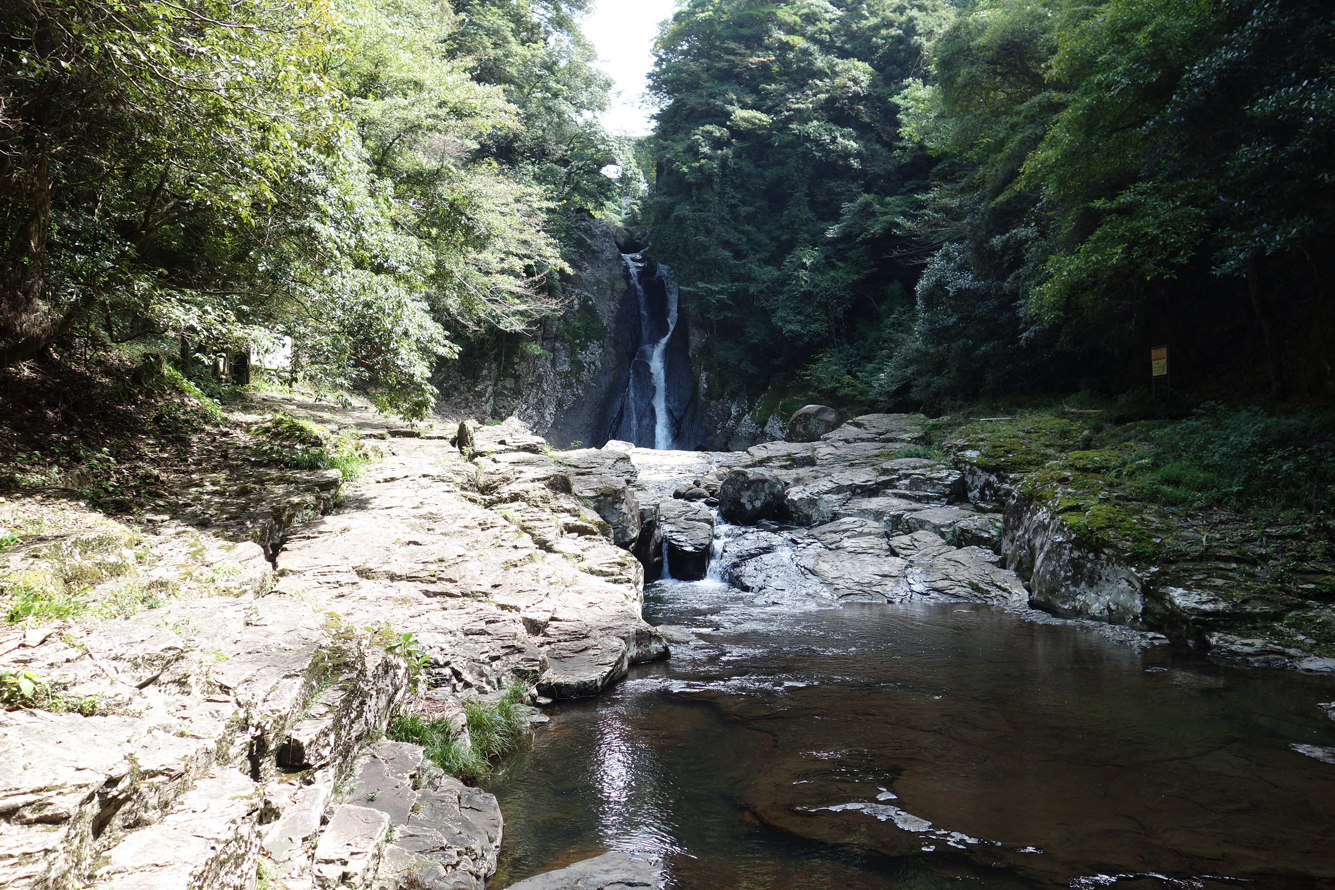 龍頭泉 20150920